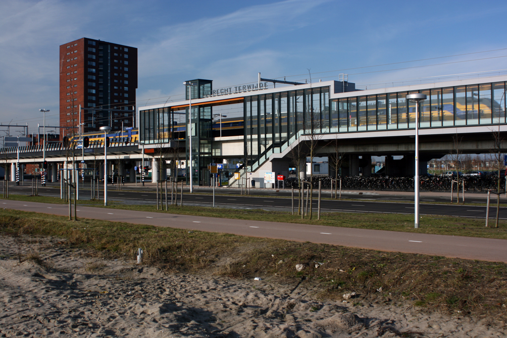 Station Utrecht Terwijde (zuidelijke zijde)